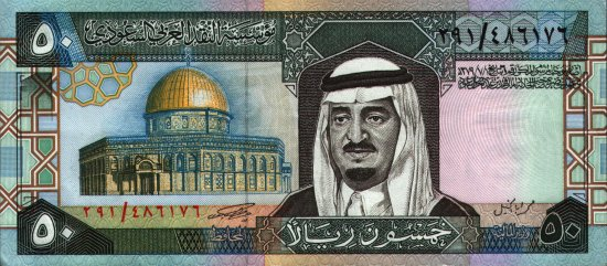 50 риалов. Саудовская Аравия, обр. 1983. Аверс.